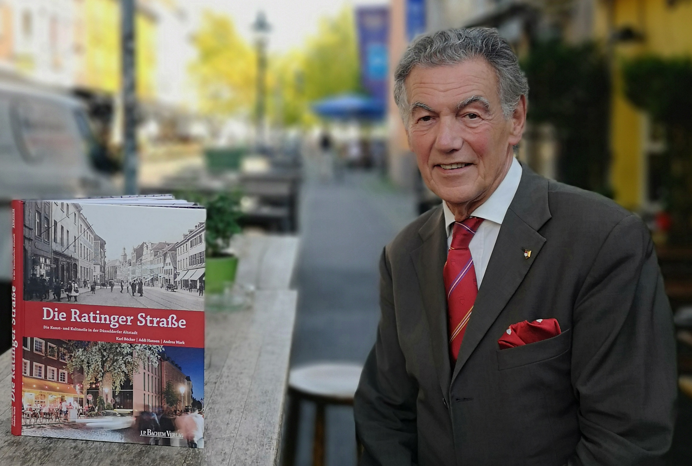 Wolfgang Rolshoven (Präsident der Düsseldorfer Jonges e.V.) in der Ratinger Straße